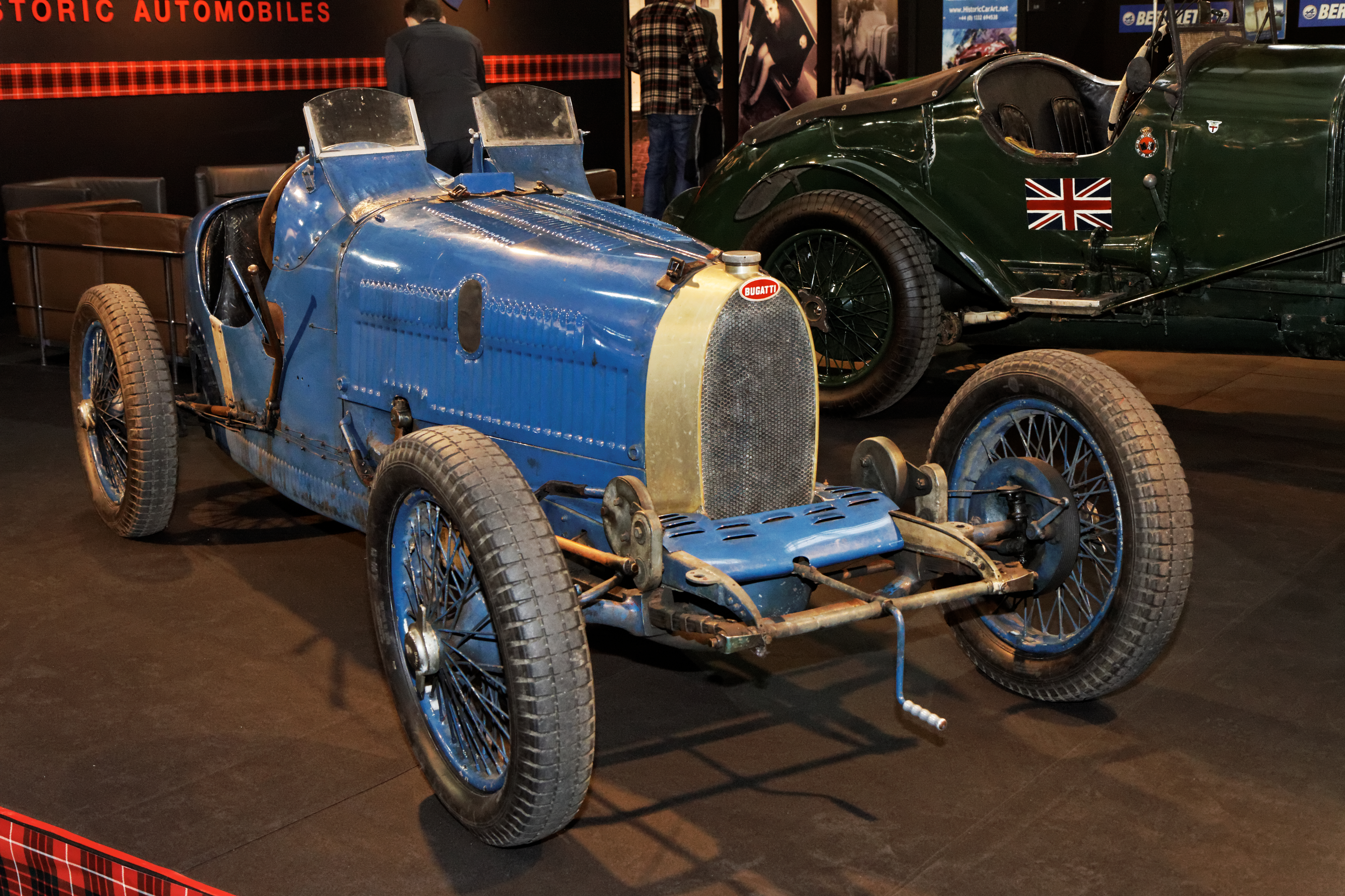 Une Bugatti type 37A présentée lors du salon Retromobile 2013.